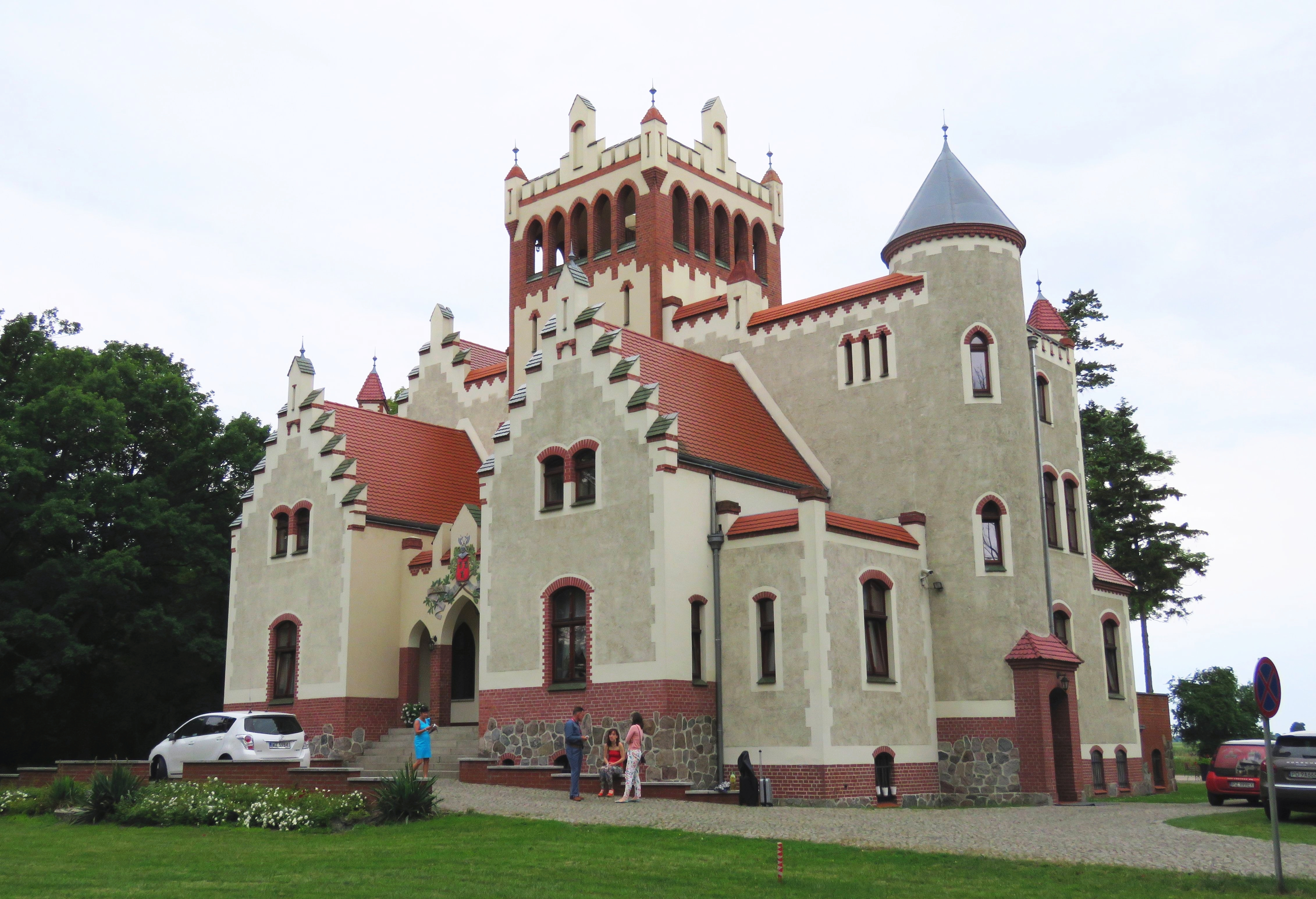 Strykowo - pałac rodu Treskow, 1900